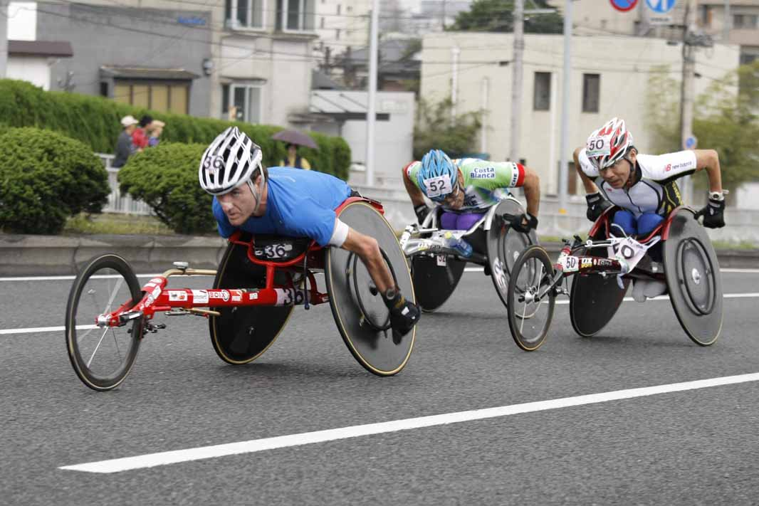 Santiago Sanz en la Maratón de Oita 2009